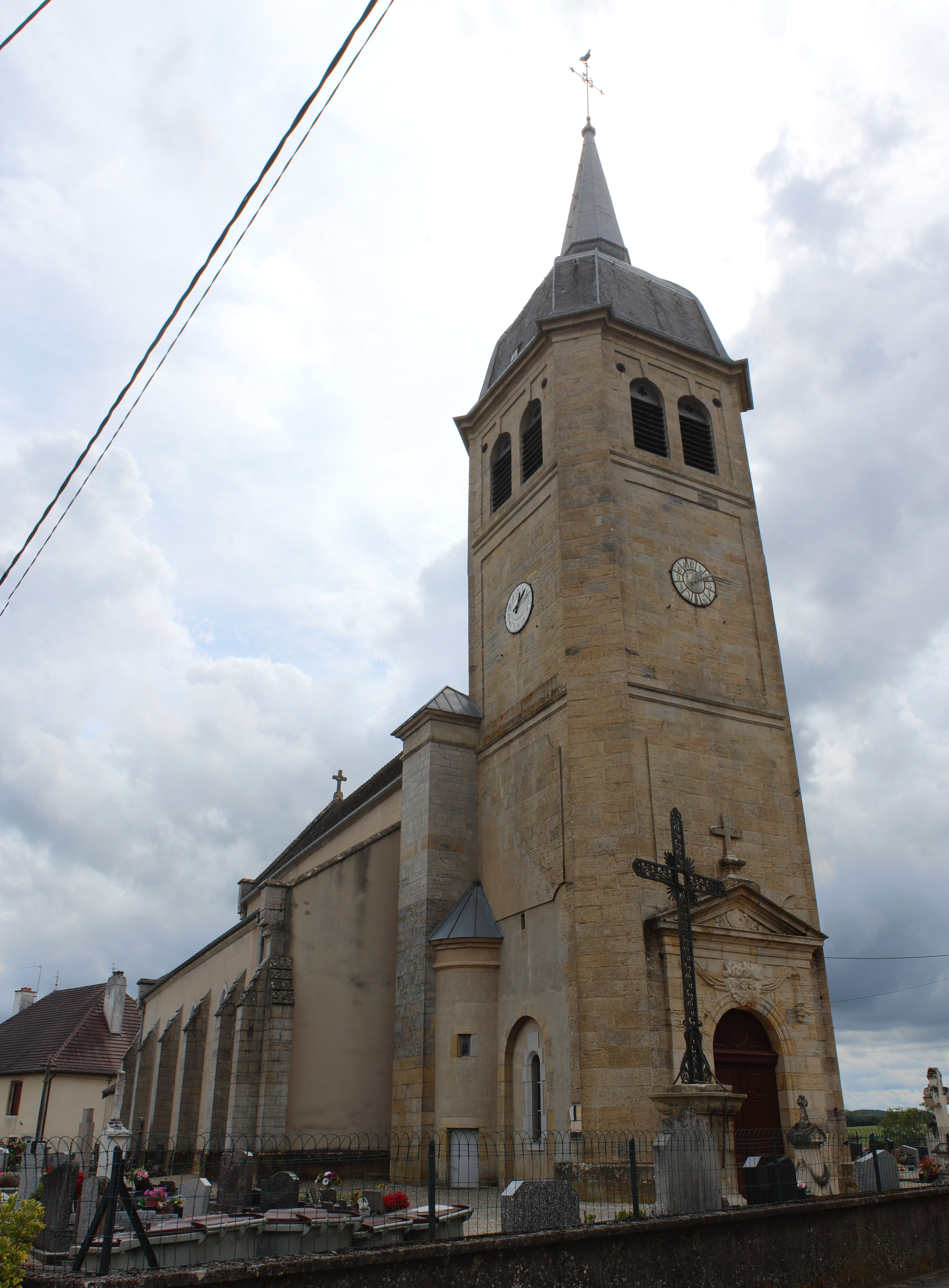 Église Saint-Jean-le-Grand-d'Autun de Colonne, Jura.